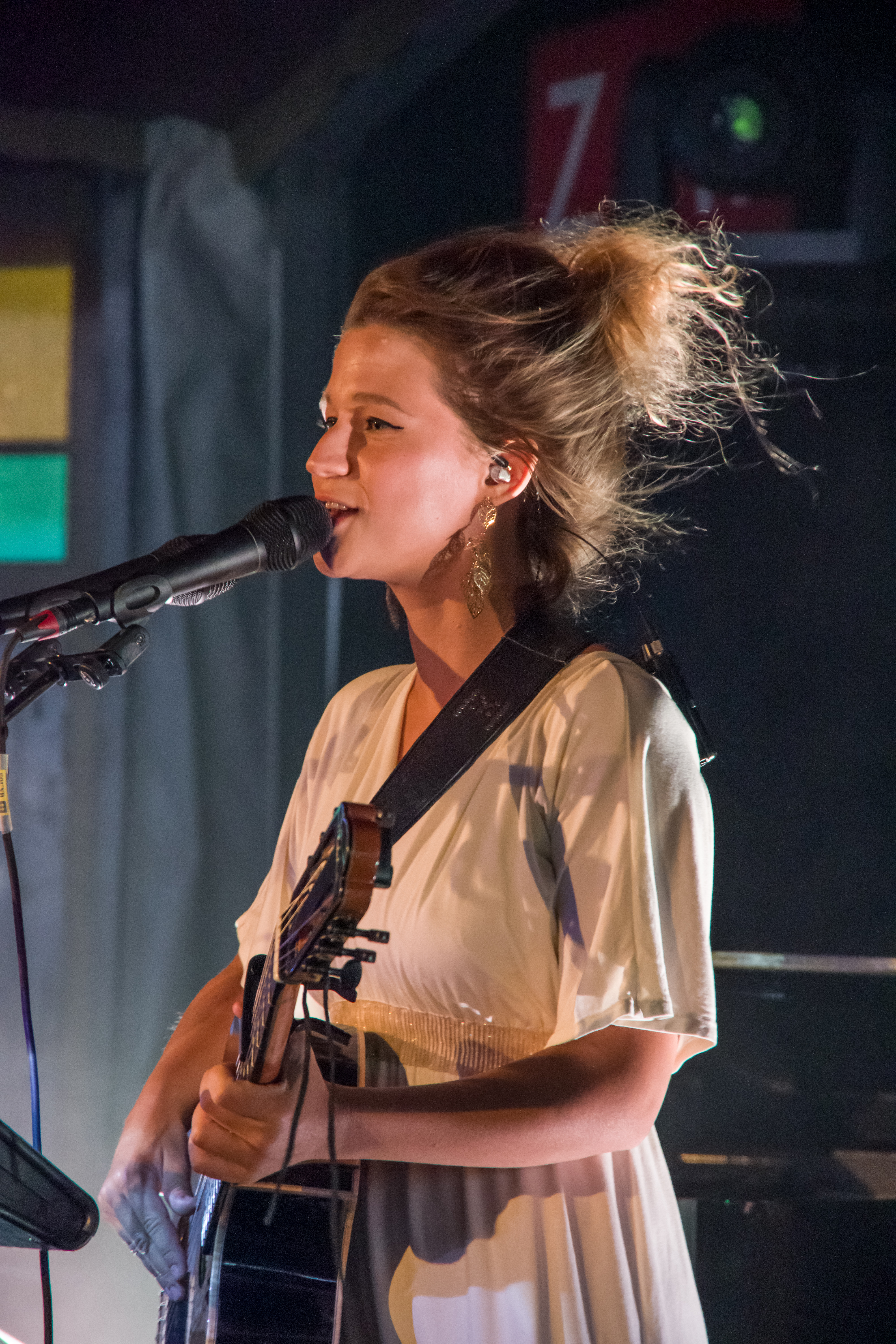 Das Zelt-Musik-Festival 2018 in Freiburg im Breisgau 26.07.2018 Selah Sue